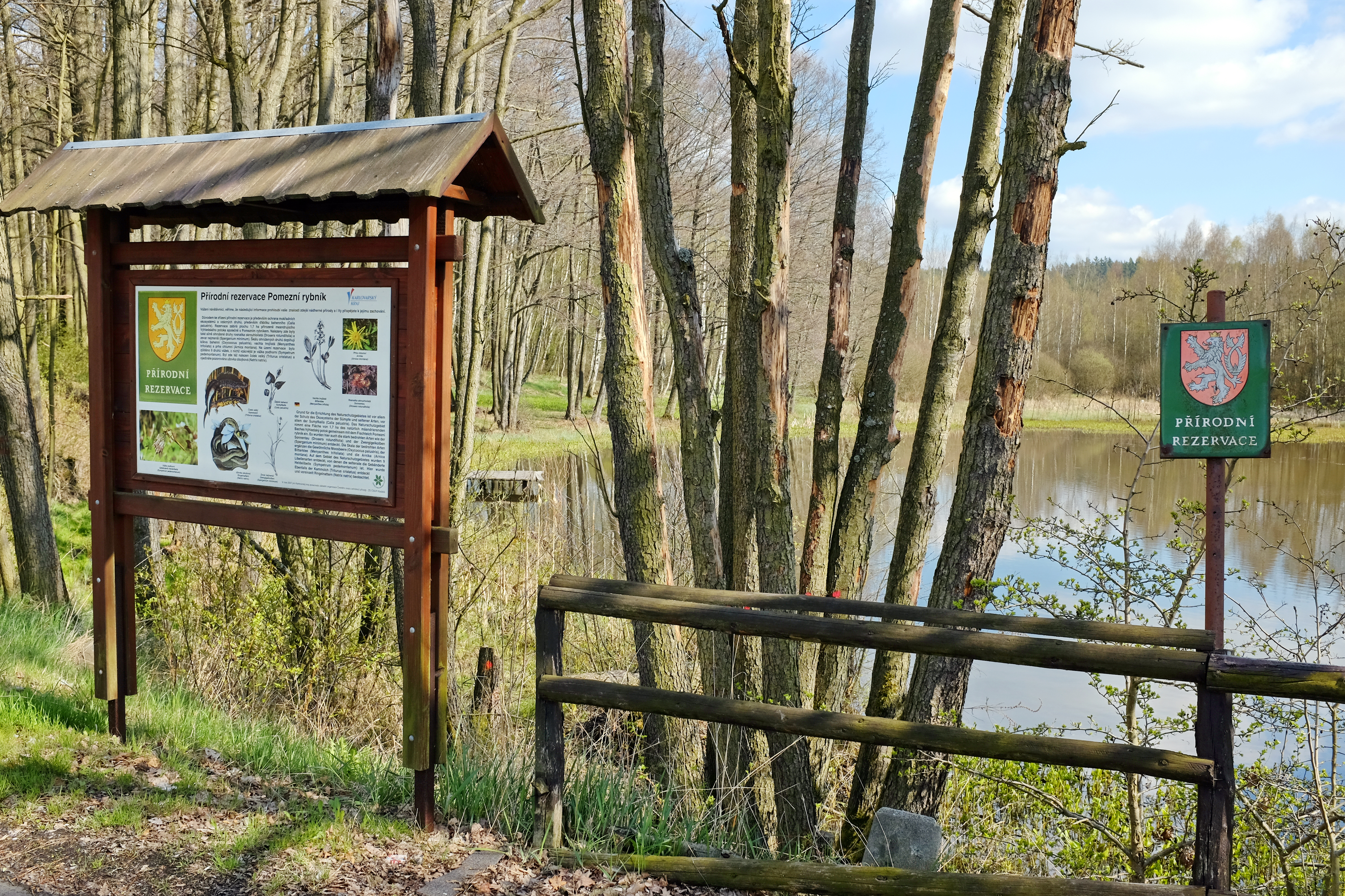 Přírodní rezevace Pomezní rybník, Pomezí nad Ohří, okres Cheb